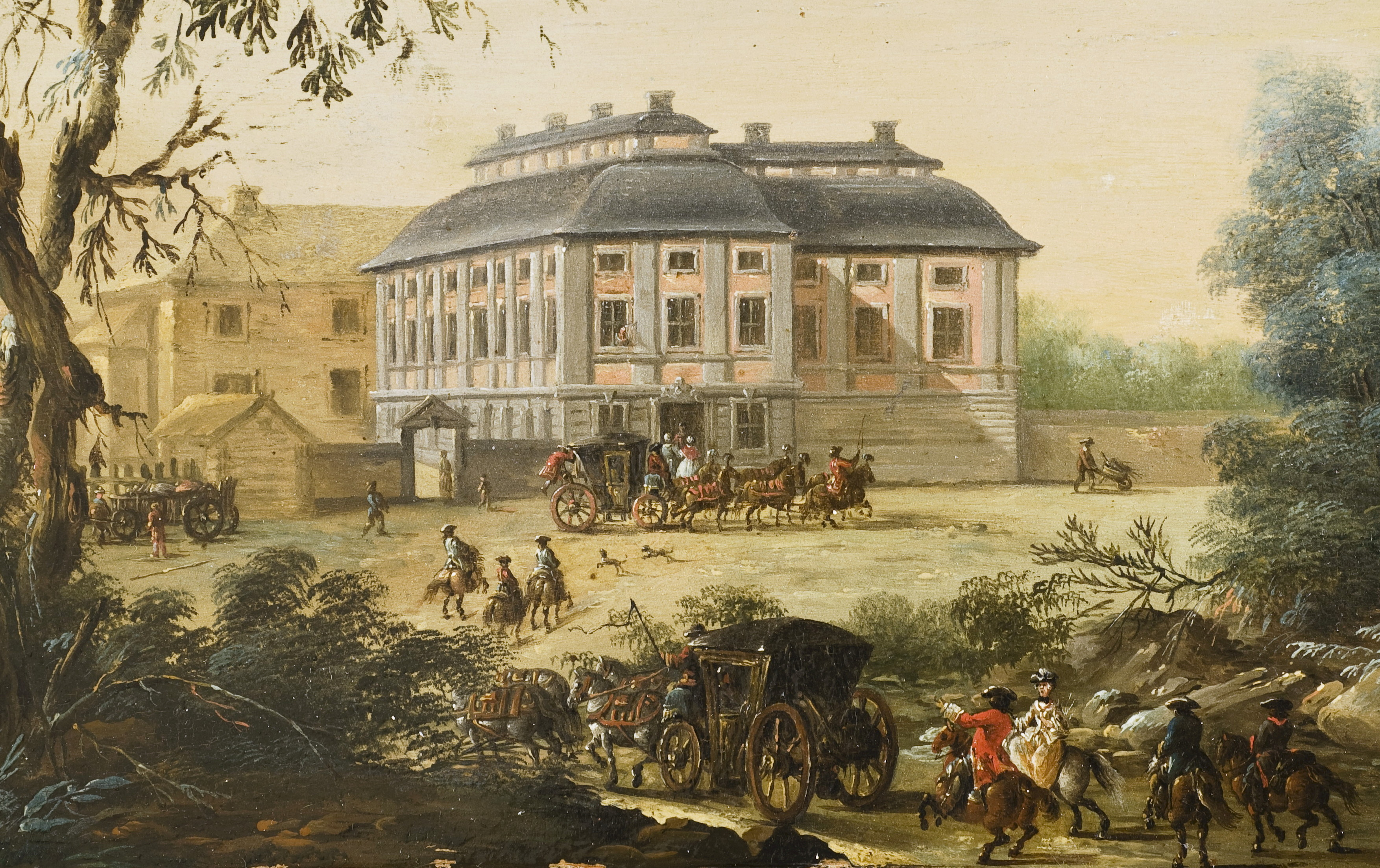 Ekolsunds slott av Johan Philip Korn efter förlaga av Erik Dahlberg